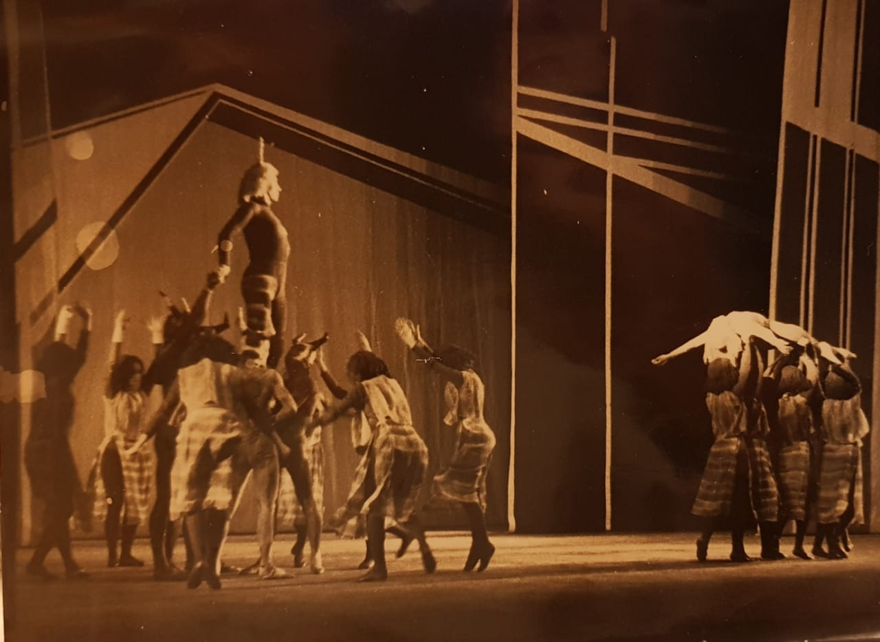 Zuimaaluti_Ballet Rio de Janeiro anos 60